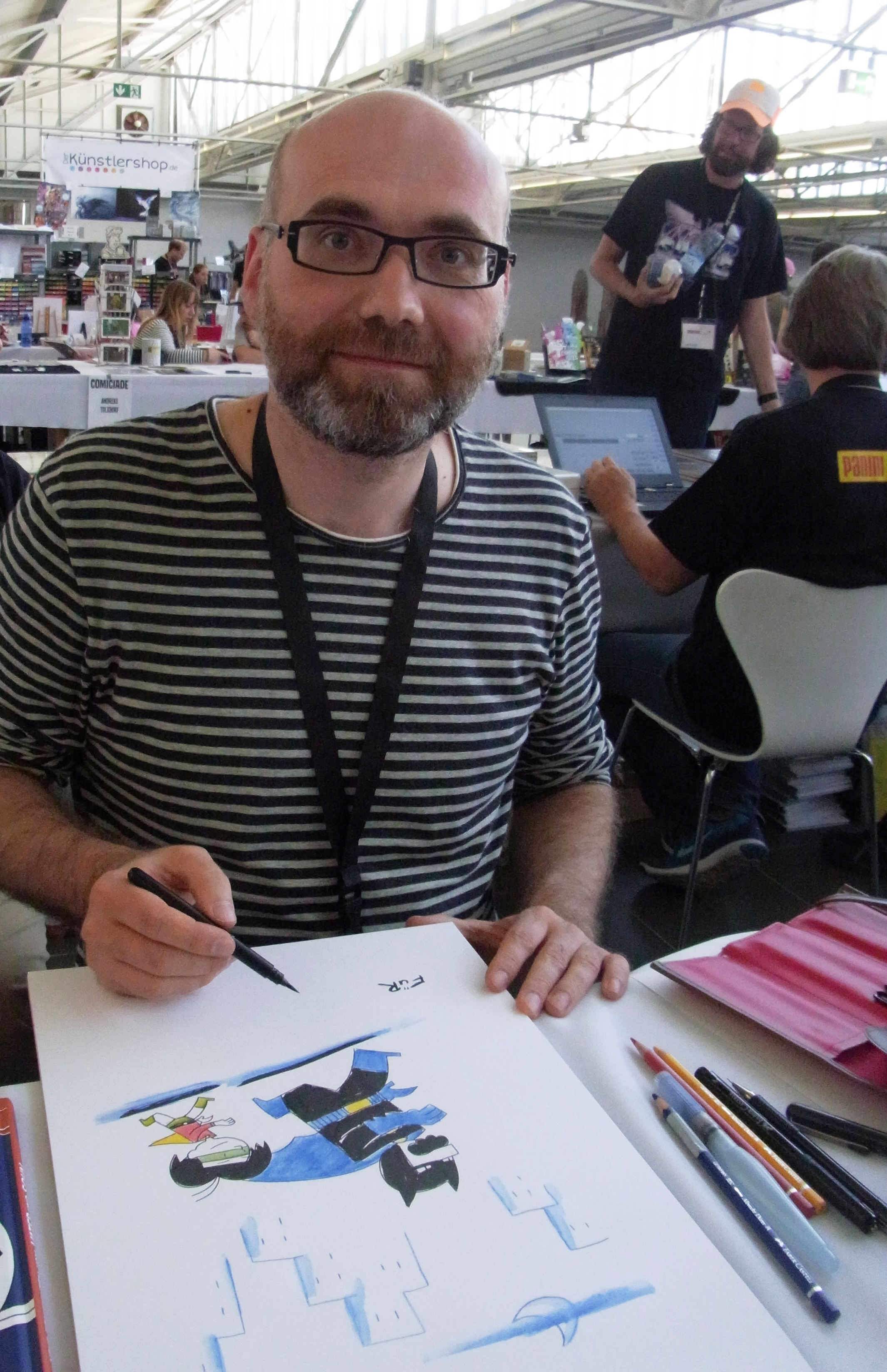 Ulf K. auf der COMICIADE 2016 in Aachen Ludwig Forum für Internationale Kunst